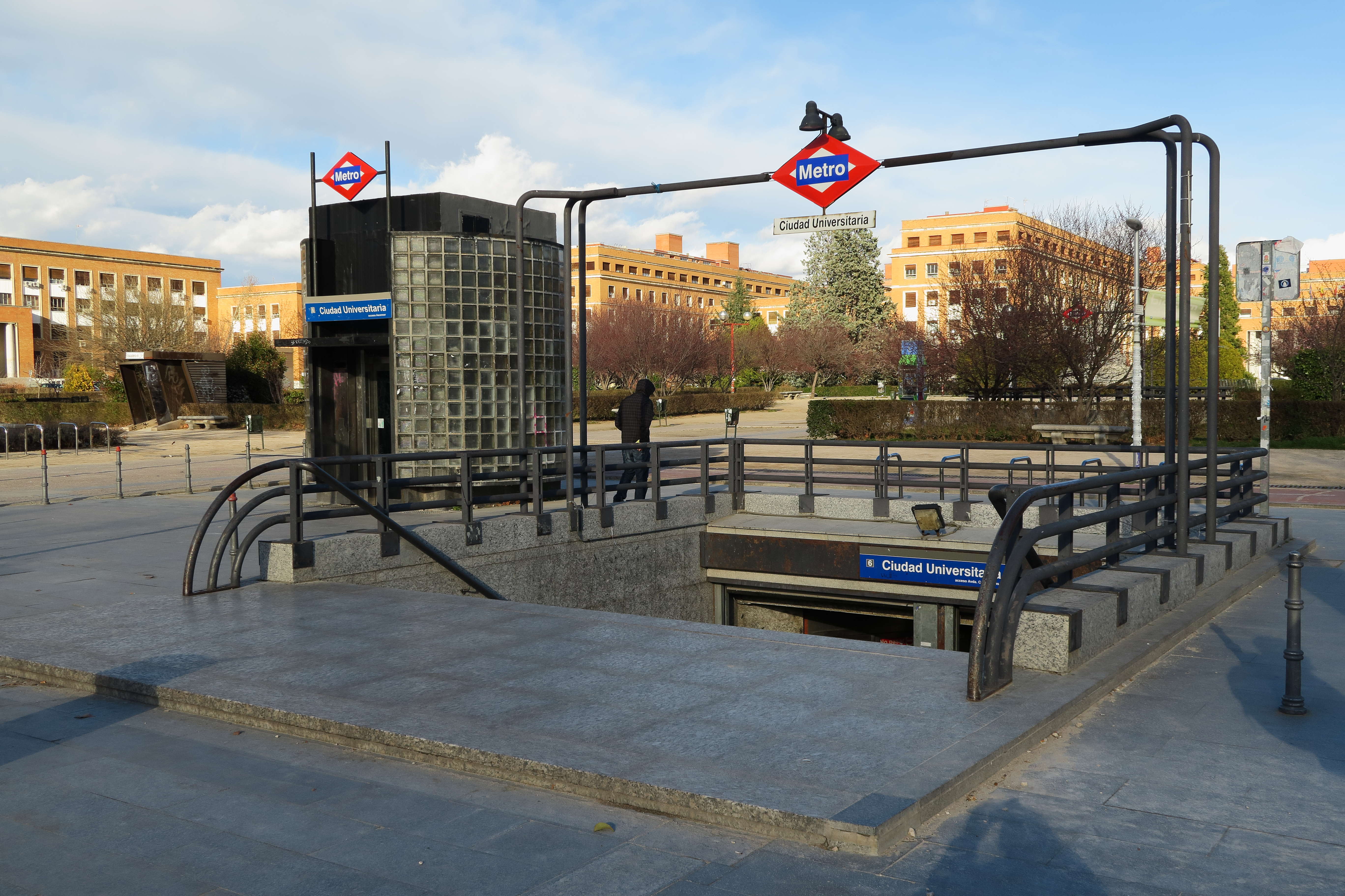 Estación de Ciudad Universitaria